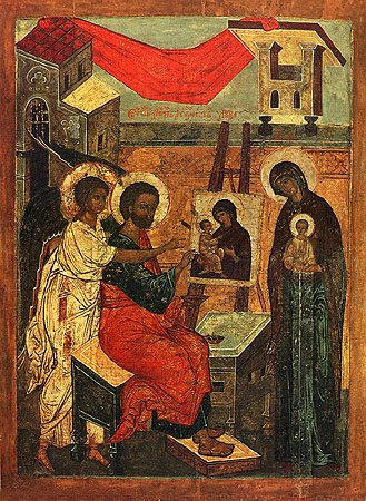 Luke the Evangelist painting Vladimirskaya icon of Our Lady. Евангелист Лука, пишущий икону Богородицы. Сер. XVI в. Псковский музей-заповедник